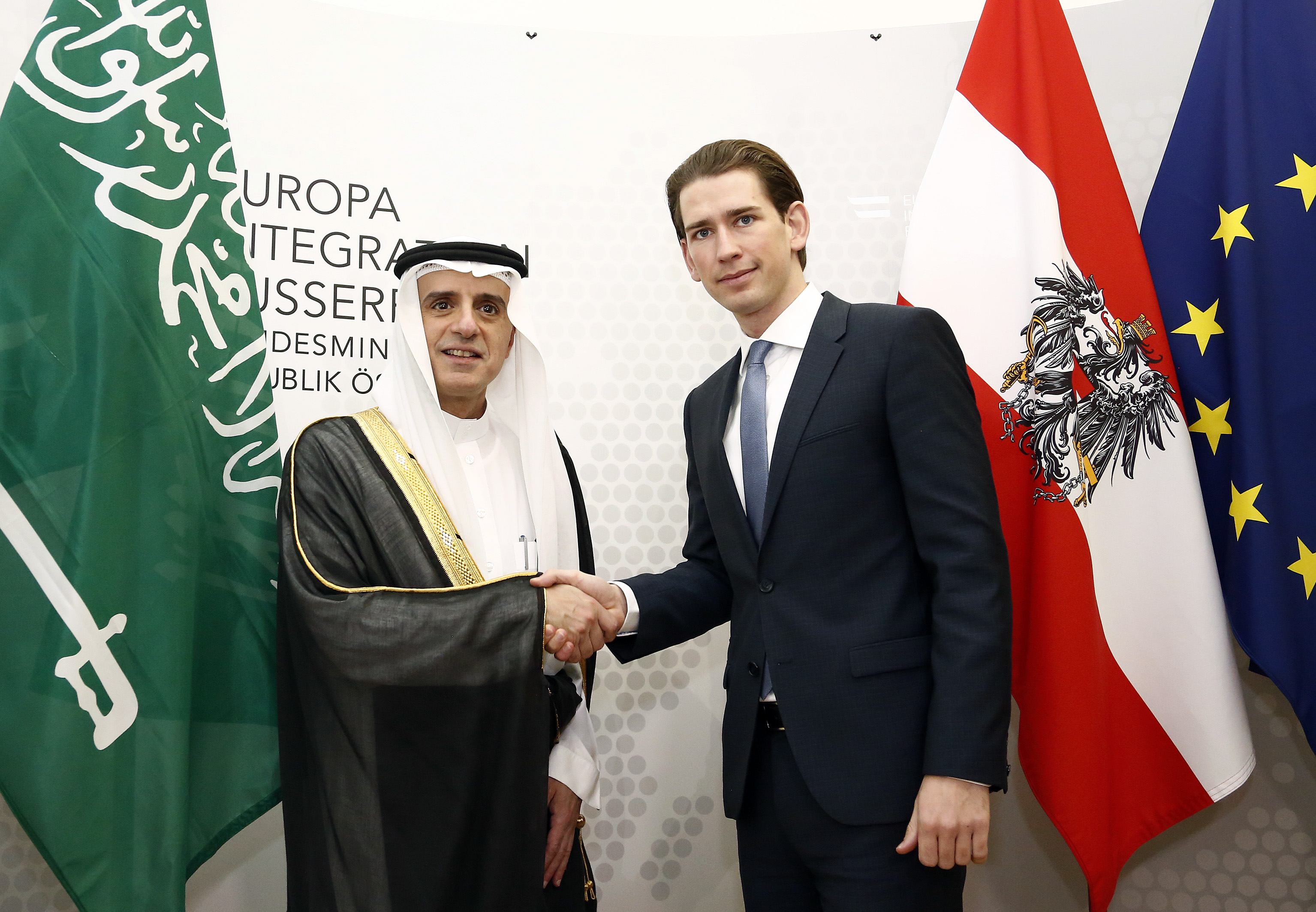 Bundesminsiter Sebastian Kurz trifft den Saudi Arabischen Außenminister Adel bin Achmed al-Dschubeir. Wien. 22.10.2015, Foto: Dragan Tatic